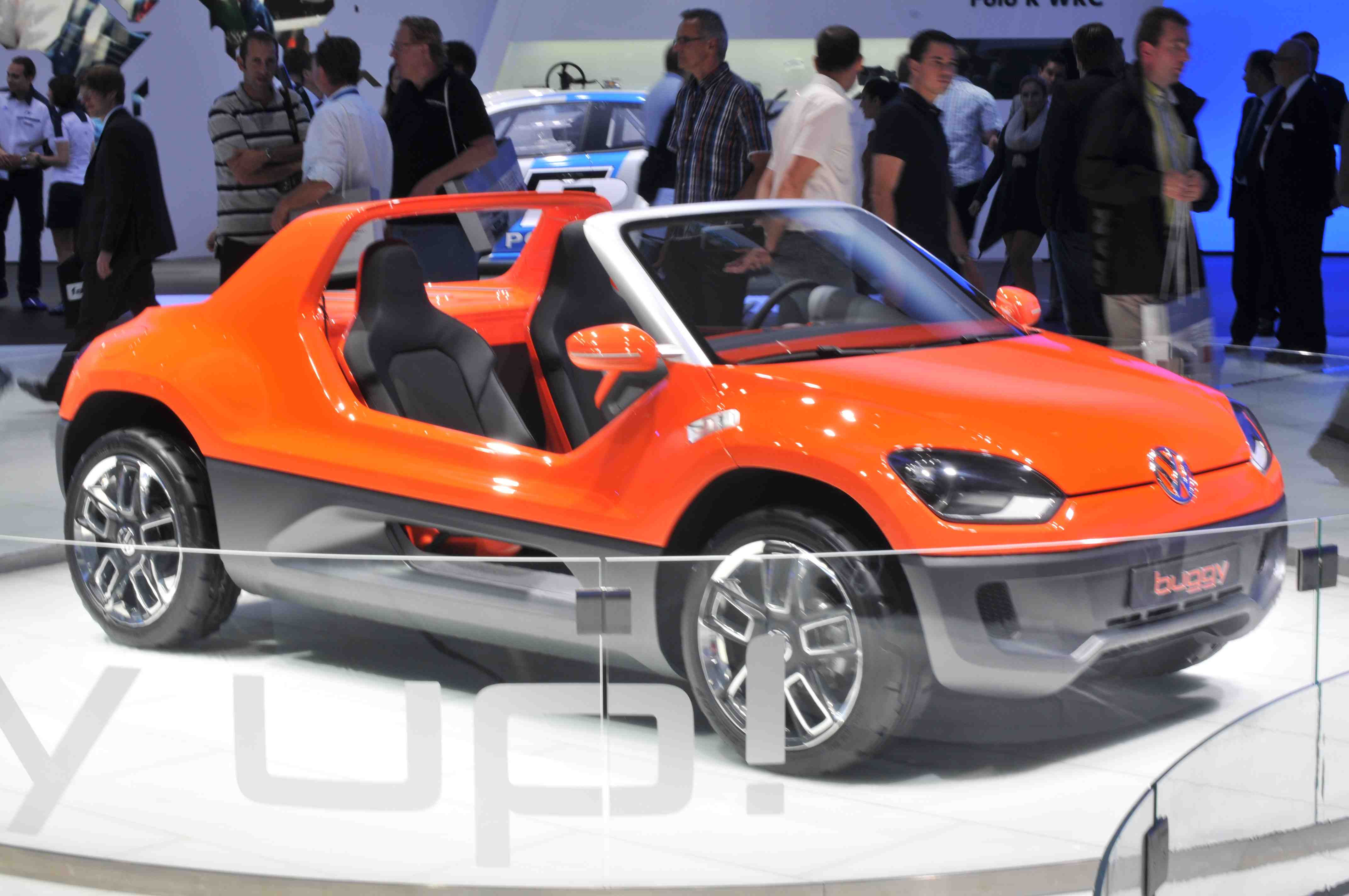 IAA 2011 - Internationale Automobilausstellung in Frankfurt/Main